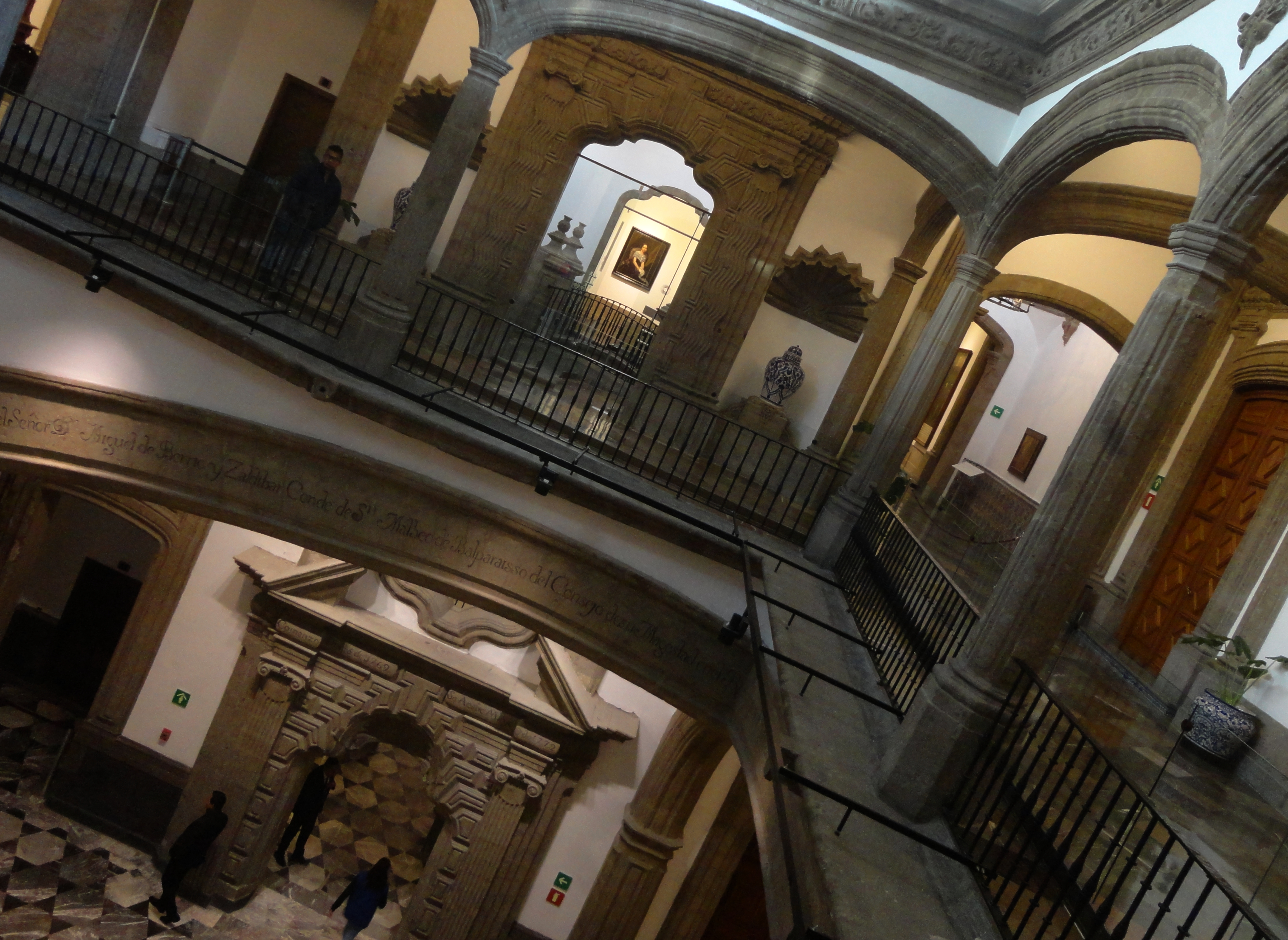 Palacio de los Condes de San Mateo de Valparaiso - Ciudad de México